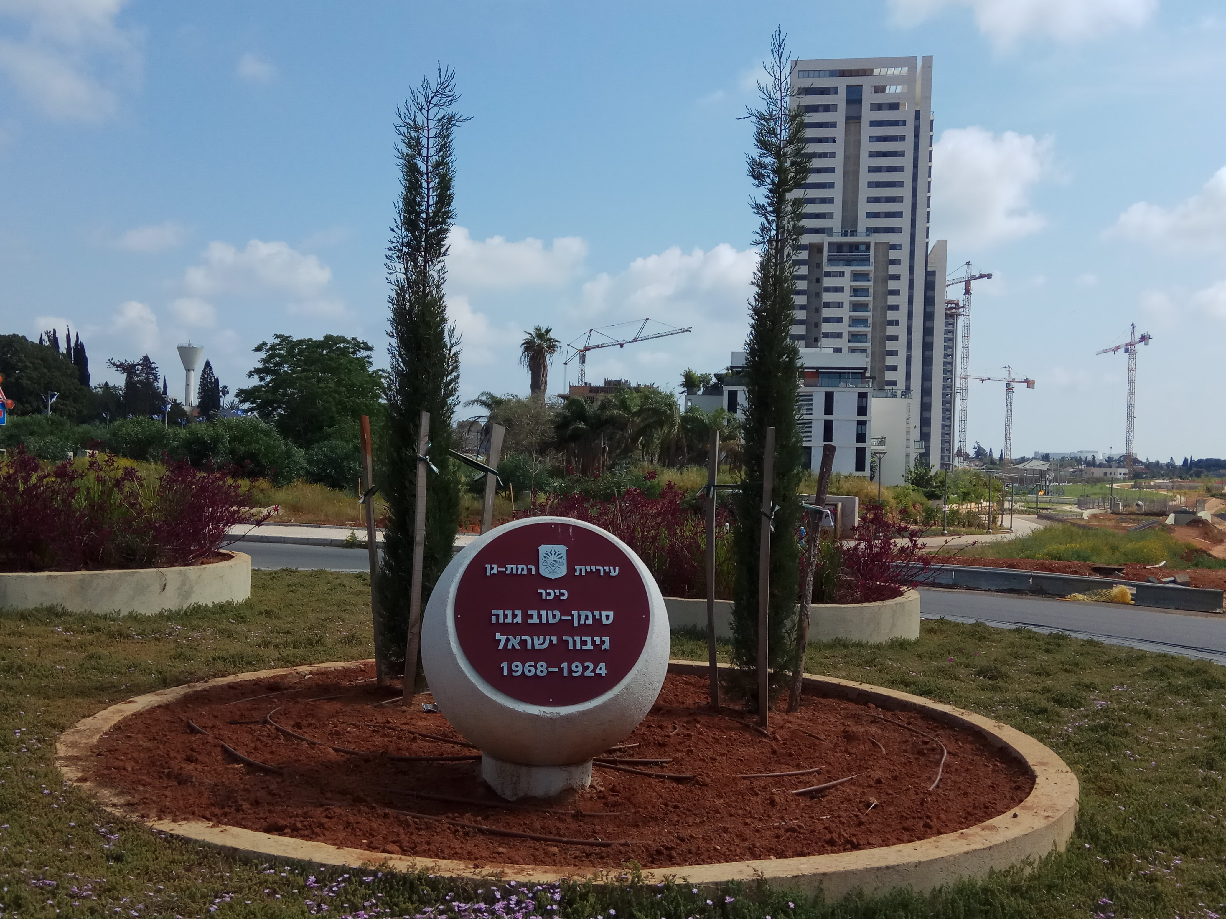 כיכר על שם סימן-טוב גנה בשכונת קריית קריניצי החדשה ברמת גן